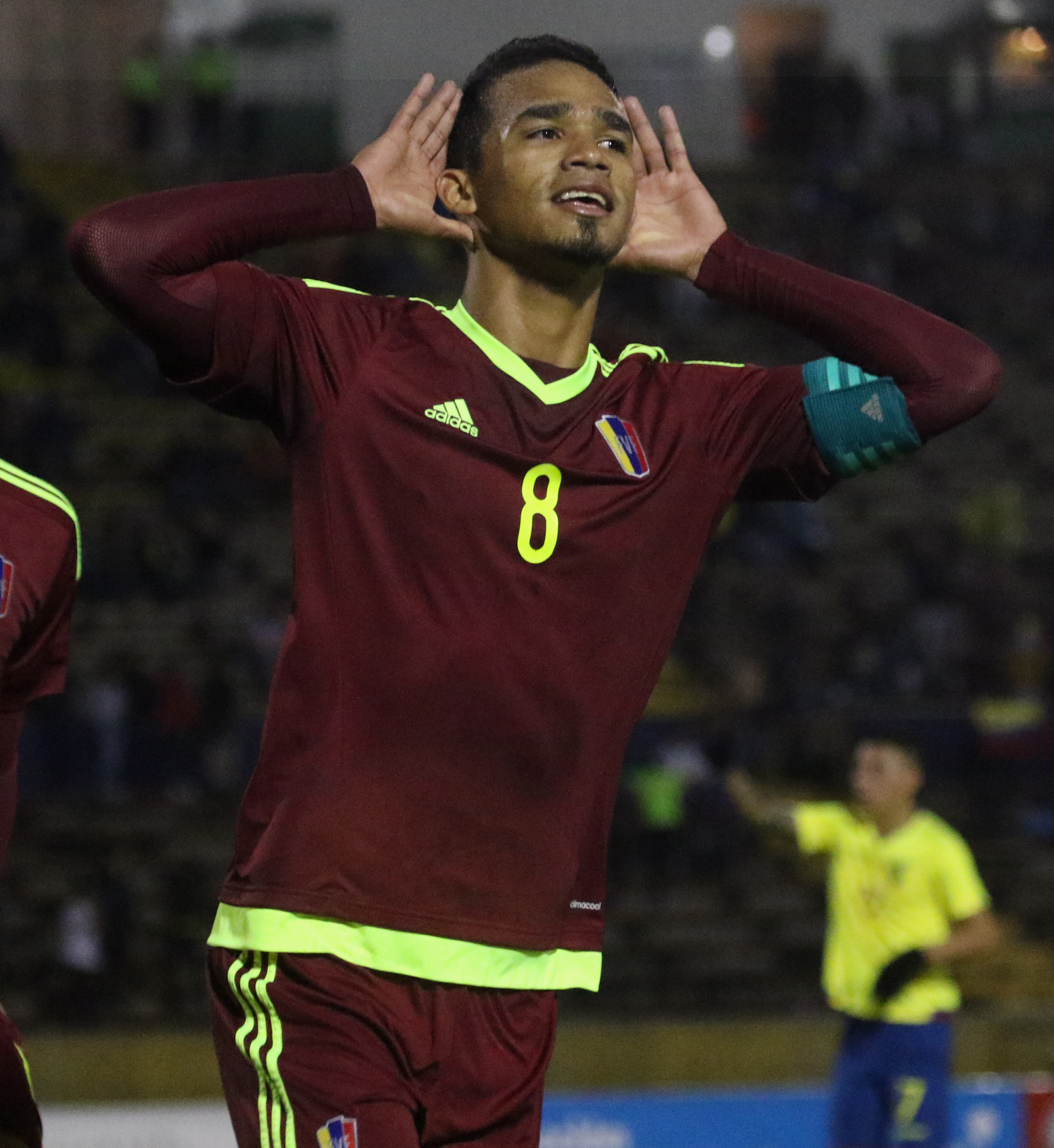 Quito, 2 feb (Andes).- La selección juvenil de Venezuela goleó 4-2 este jueves a su par de Ecuador, que comprometió seriamente sus opciones de clasificar al Campeonato Mundial Sub 20 Corea del Sur 2017, que se desarrollará en mayo próximo. ANDES/Micaela Ayala V.